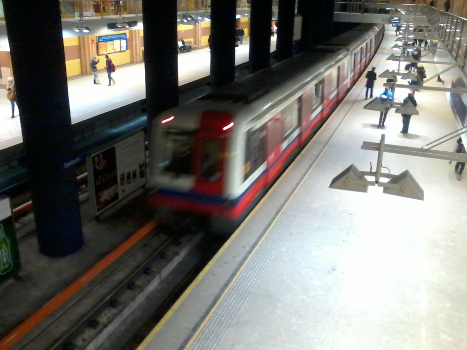 Une rame du métro de varsovie vue de la mezzanine de la station Centrum